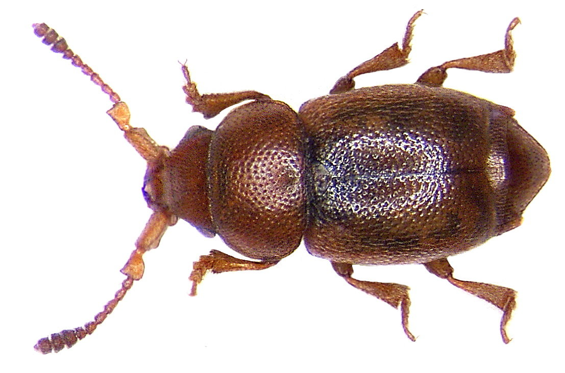 Familie: Kateretidae Groesse: 1,6-3 mm Verbreitung: Europa Ökologie: in feuchten Biotopen Fundort: Germania, Bayern, Oberfranken, Neuenreuth leg.det. U.Schmidt, 1982 Foto: U.Schmidt, 2005